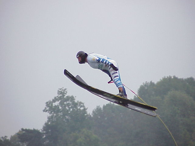 Questa foto ritrae Andrea Alessi in un allenamento di salto.